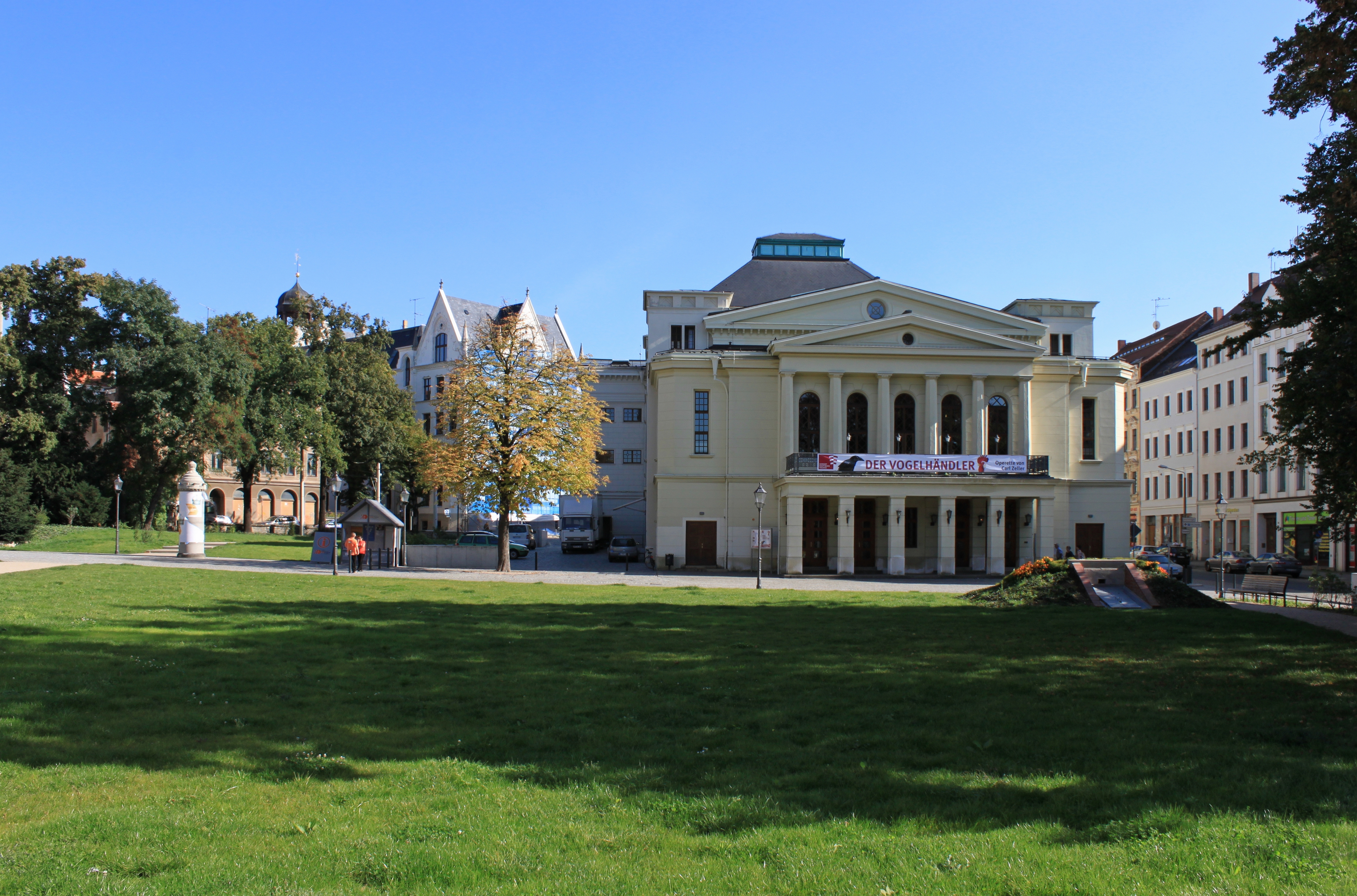 Blick über den Demianiplatz zum Theater